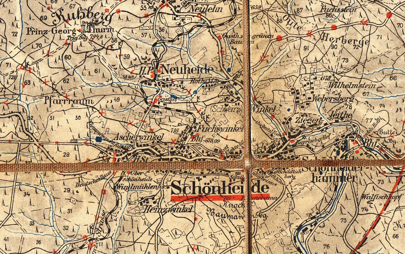 Schönheide im Erzgebirge: Ortsteile in einer Karte von um 1900. Zusätzlich sind angegeben Bahnhöfe und Haltepunkte der Schmalspurbahn Wilkau-Haßlau – Carlsfeld und der Bahnstrecke Chemnitz–Adorf , Rathaus, Fabriken „Flemmingsche Fab.“, „Oschatz Fabr.“), Elektrizitätswerk, Postamt, Schule, Hotels und Gaststätten (im Ascherwinkel das Deutsche Haus, später Hotel Carola genannt; im unteren Mitteldorf „Gambrinus“, heute Bäckerei Schelz und daneben Lebensmittelgeschäft mit Aufschrift Konsum; im Unterdorf „Bayrischer Hof“; im Schönheiderhammer Hendels Hotel, später Carlshof genannt) Der Ortsteil Schwarzwinkel ist so bezeichnet, dass der erste Namensteil in Klammern steht: (Schwarz)Winkel. Die im 20. Jahrhundert als Straße verstandene und so bezeichnete Ziegenleite ist als Ortsteil dargestellt: „Ziegenleithe“. Denn Straßennamen gibt die Karte nicht an.